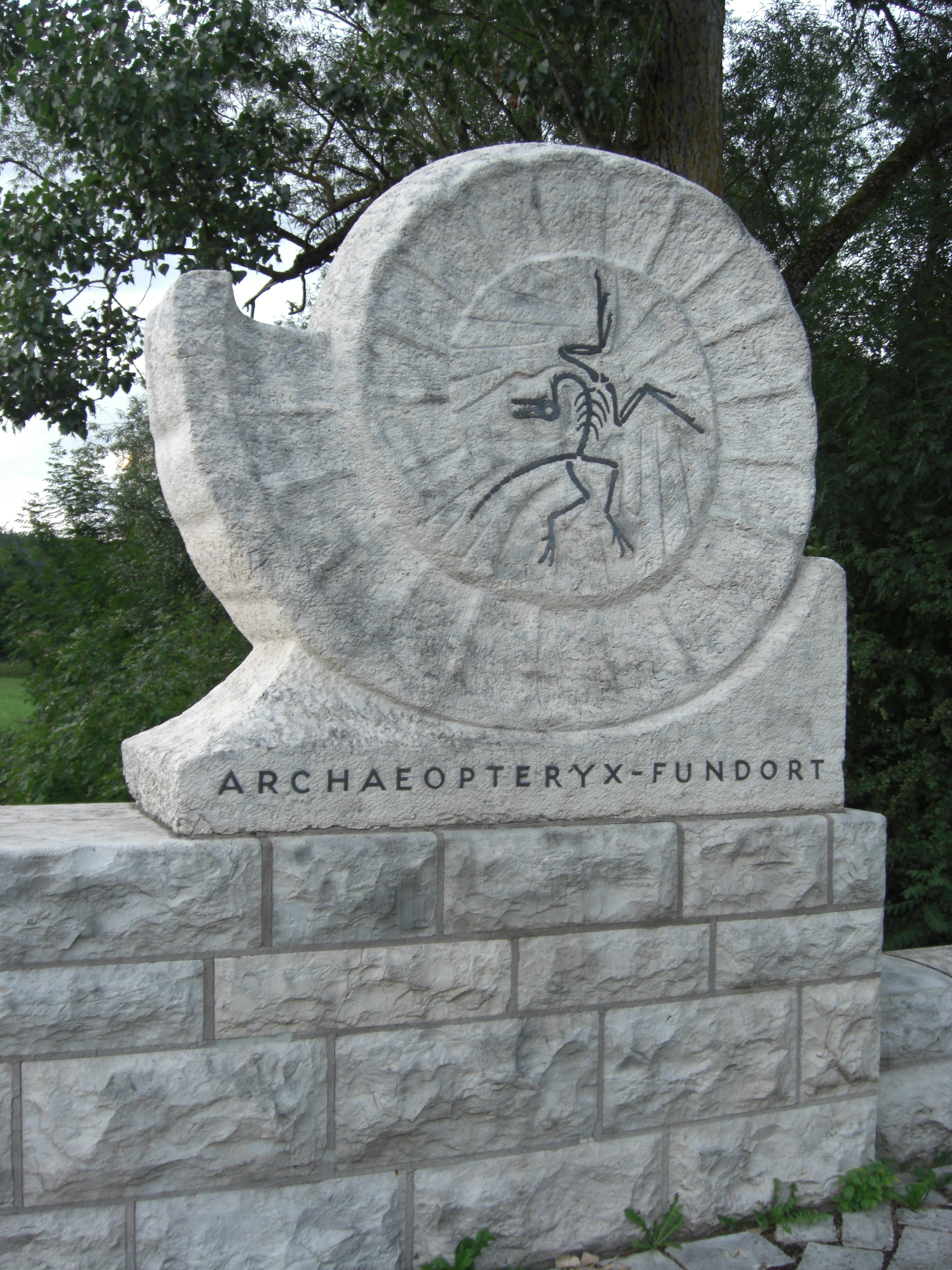 Archaeopteryx-Denkmal bei Solnhofen